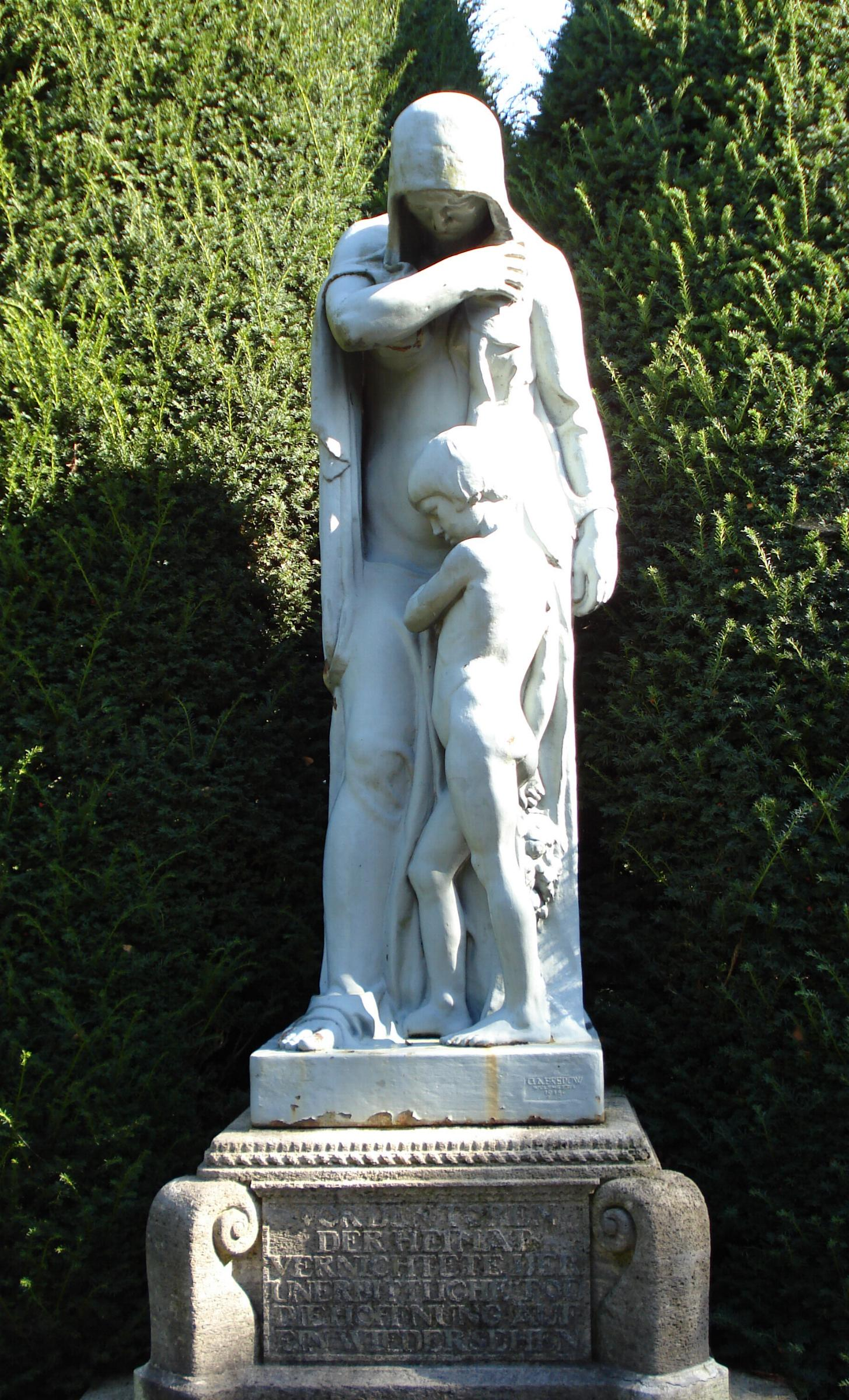 Rotterdam Crooswijk, begraafplaats. Monument 1914-1918 (Duitse dame) van Gustav Adolf Bredow. Rotterdam/The Netherlands.